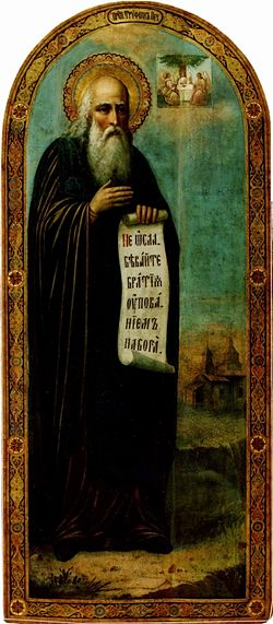 Трифон Печенгский. Мурманский музей